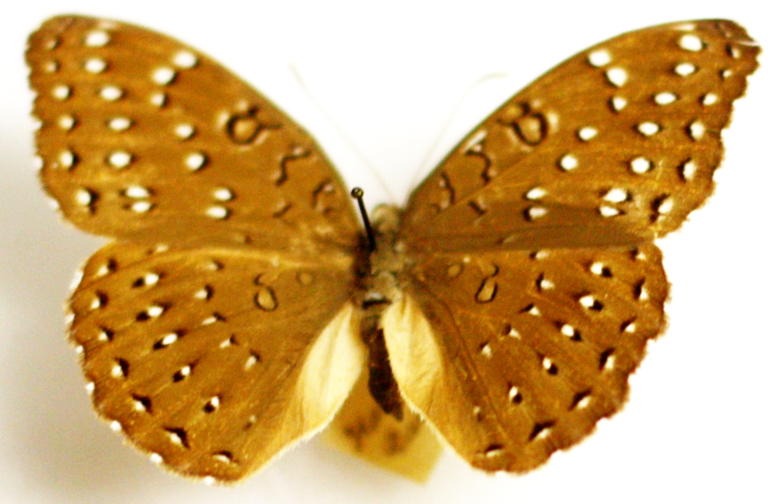 Naturkundliche Sammlung Übermaxx Überseenuseum Bremen; Schmetterlinge und andere Hamanumida daedalus (Fabricius 1775)